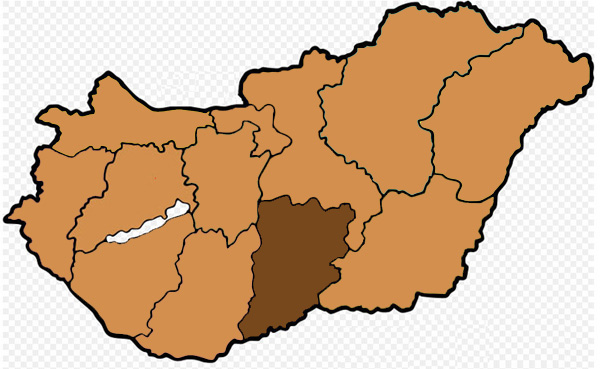 Mappa dell'arcidiocesi cattolica di Kalocsa-Kecskemet, in Ungheria. Lavoro personale eseguito da questa immagine di Commons.